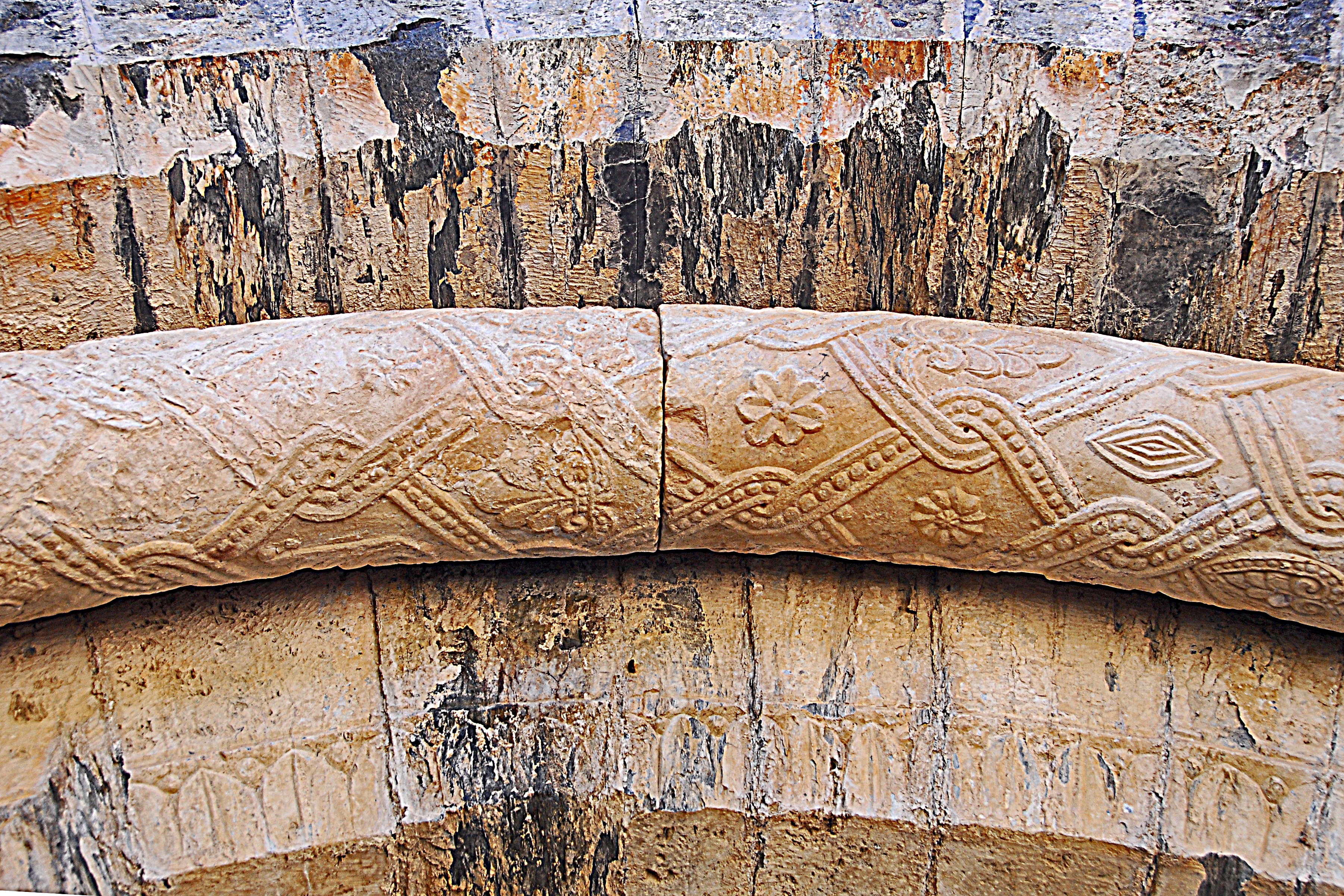 Serrabone, Nordportal, Archivoltenbogen